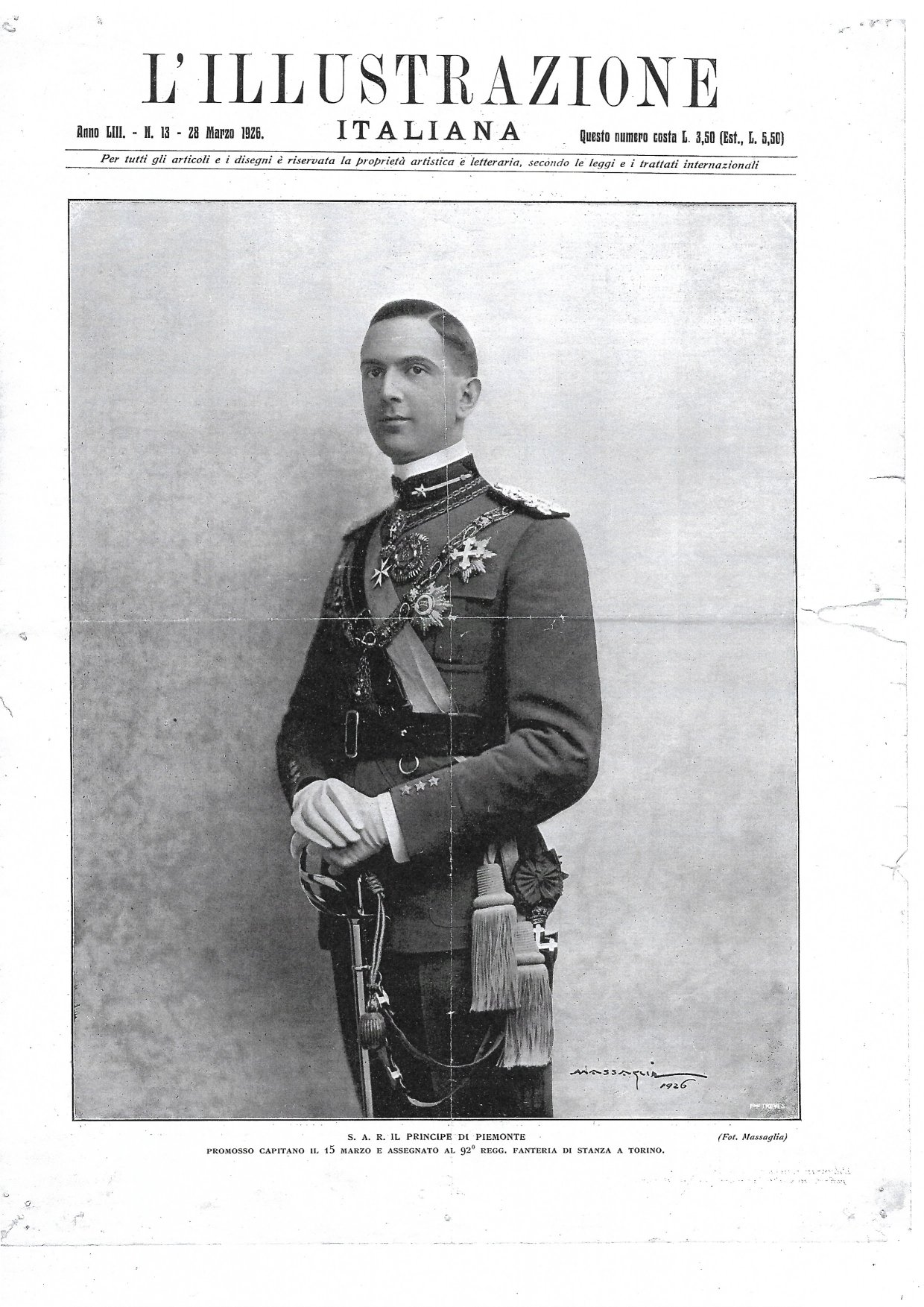 L'Illustrazione Italiana Anno LIII N. 13 28 Marzo 1926 - S.A.R. Il Principe di Piemonte promosso Capitanoil 15 Marzo e assegnato al 92° Regg. Fanteria di stanza a Torino